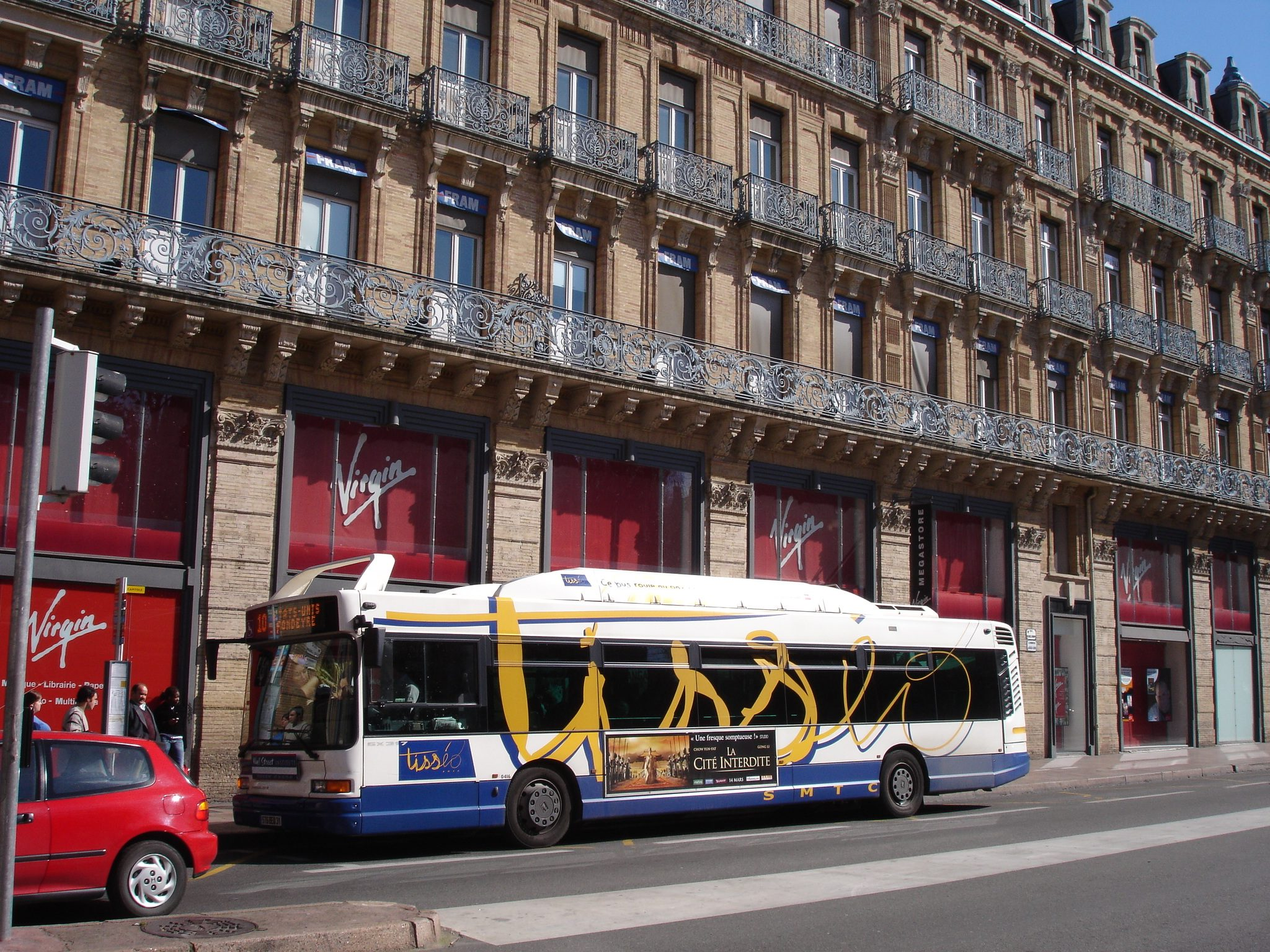 Un bus Heuliez de Tisséo, rue d'Alsace-Lorraine à Toulouse (Haute-Garonne, France).